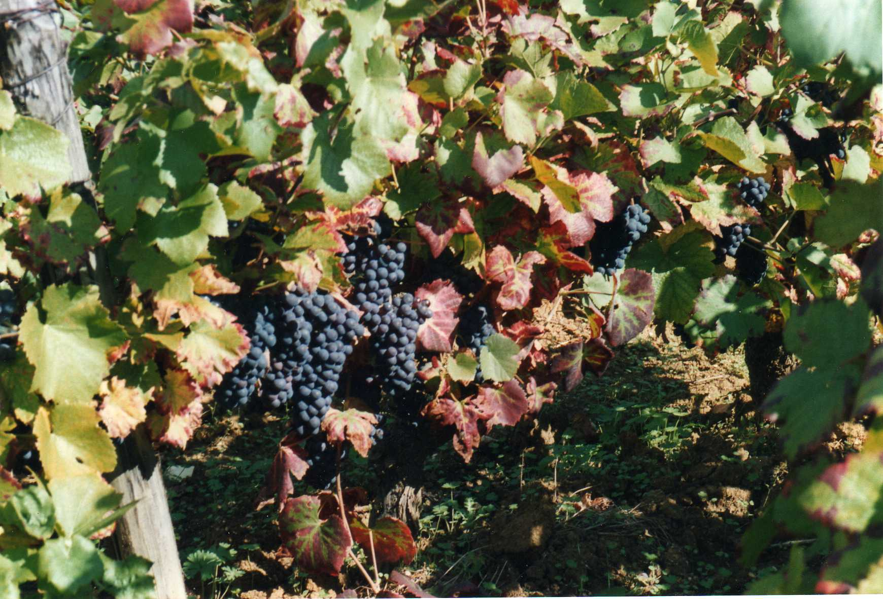 Vignes juste avant les vendanges